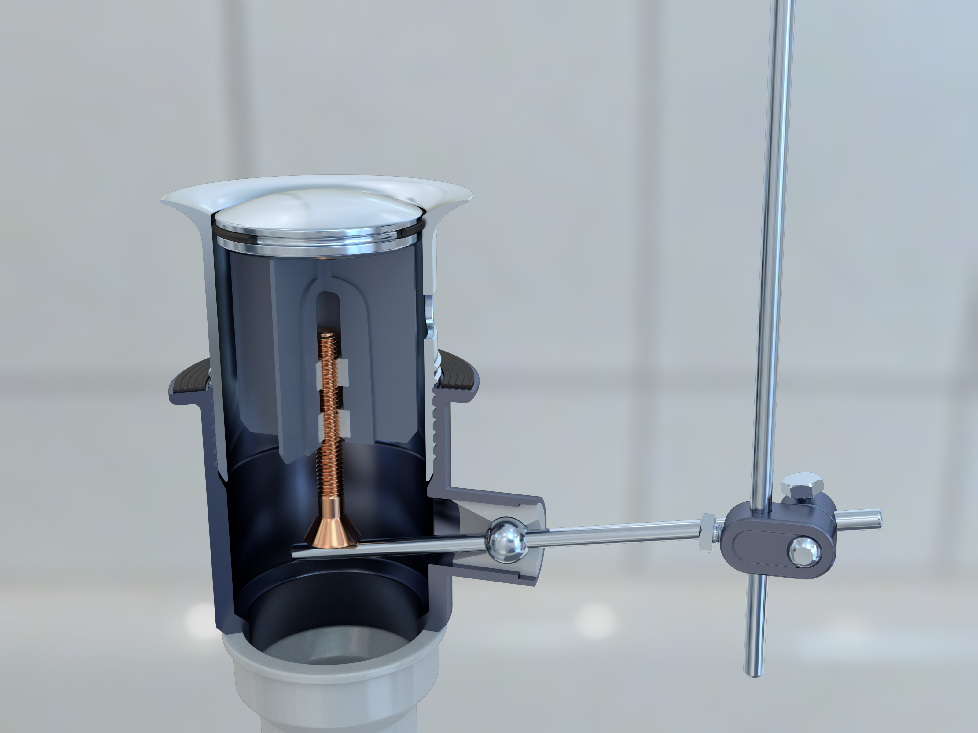 Ablaufventil mit Exzenter im geschlossenen Zustand für Waschbecken.